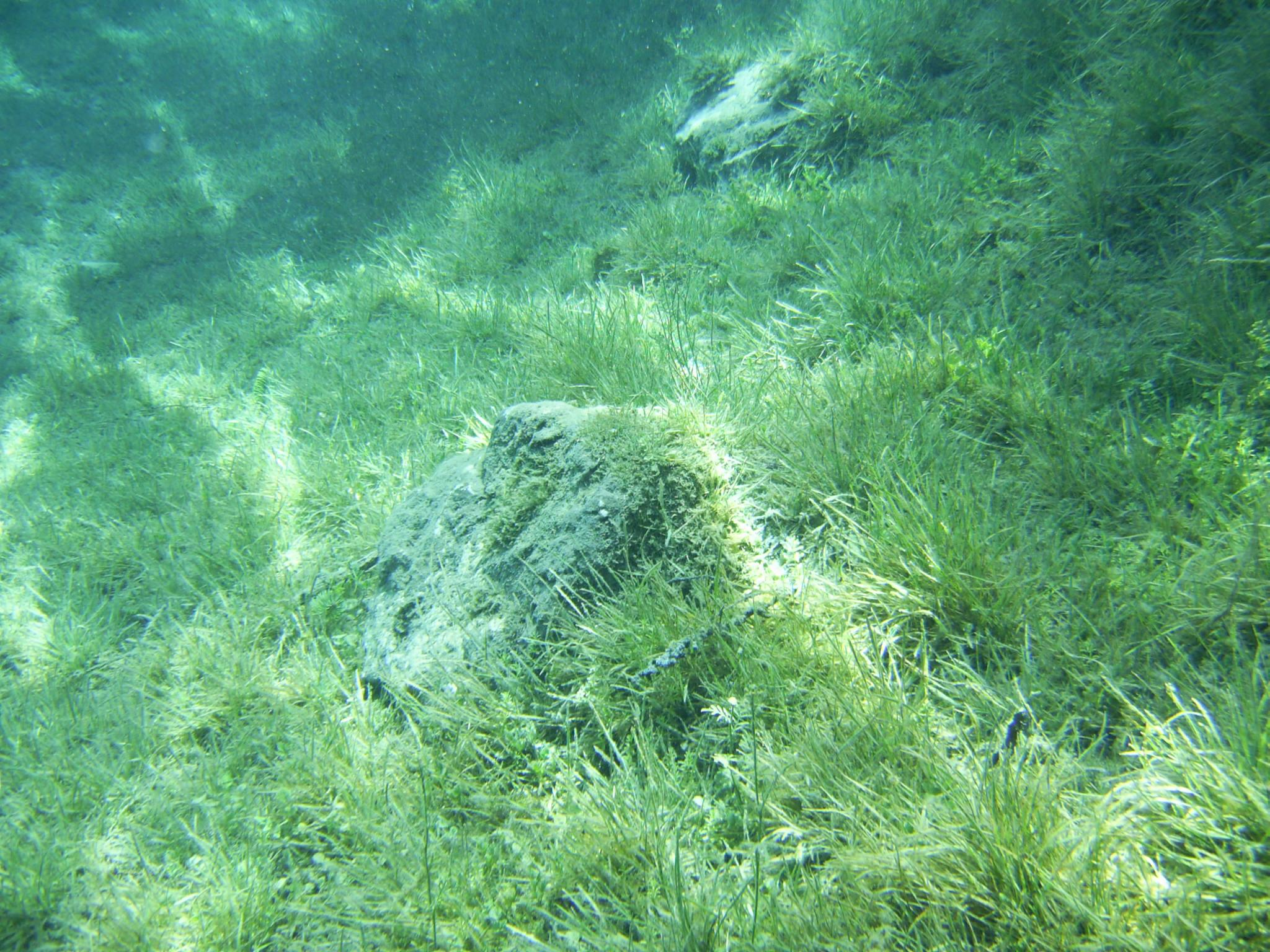 DIGITAL CAMERA 2006 - Grüner See